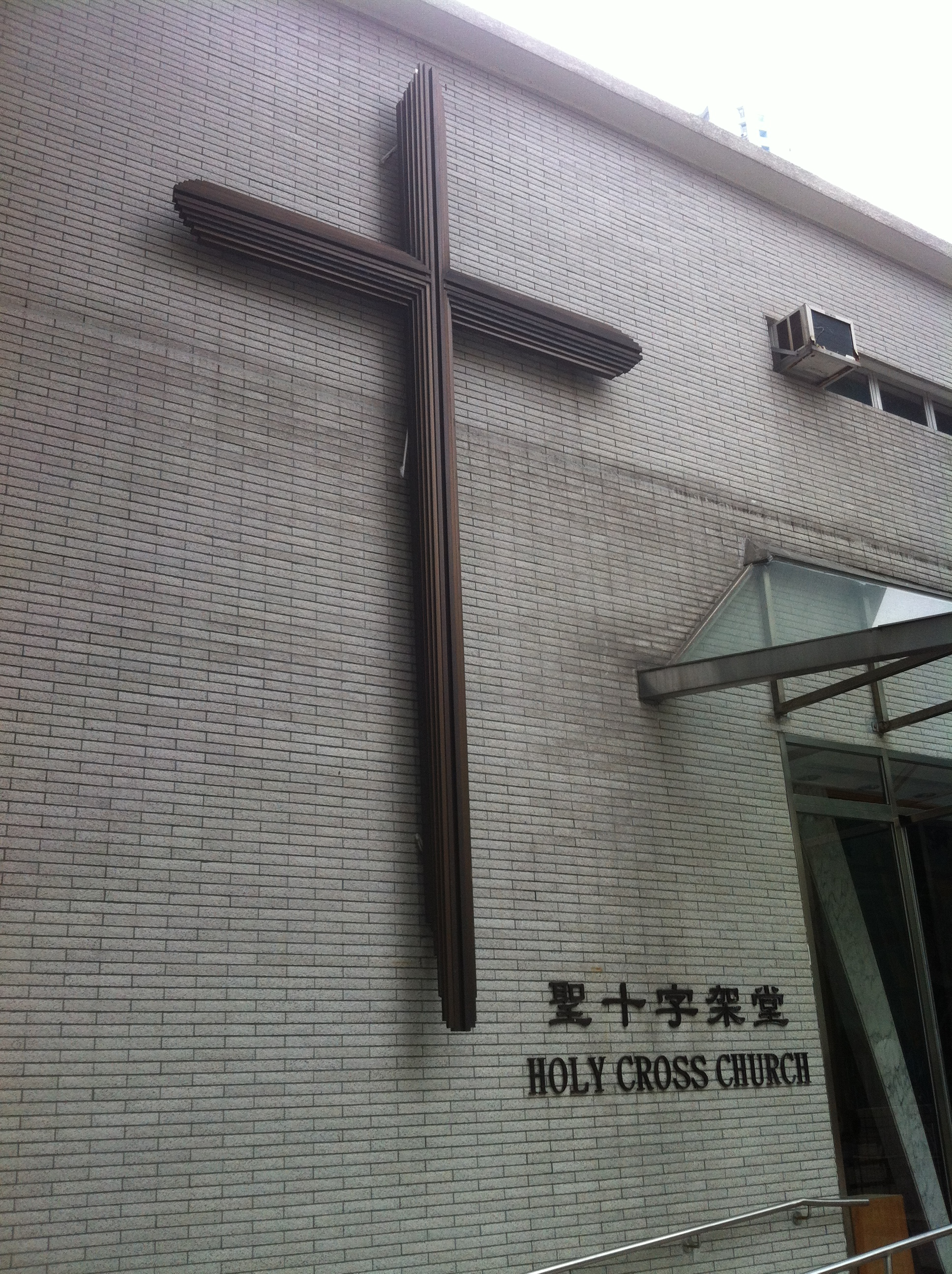 中文（香港）: 聖十字架堂, 香港, 中國